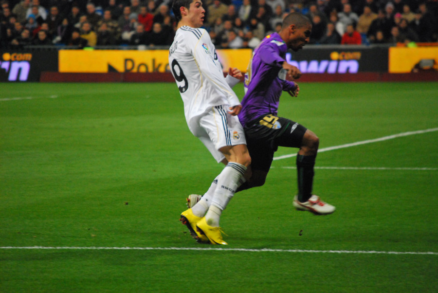 Real Madrid 2 - Malaga 0 24 enero 2010